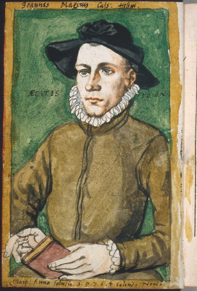 Johannes Magirus, Student der Theologie in Marburg 1576, älteste bekannte Abbildung eines Marburger Studenten, Aquarellfederzeichnung aus seinem Stammbuch, Rechte abgelaufen, Public Domain